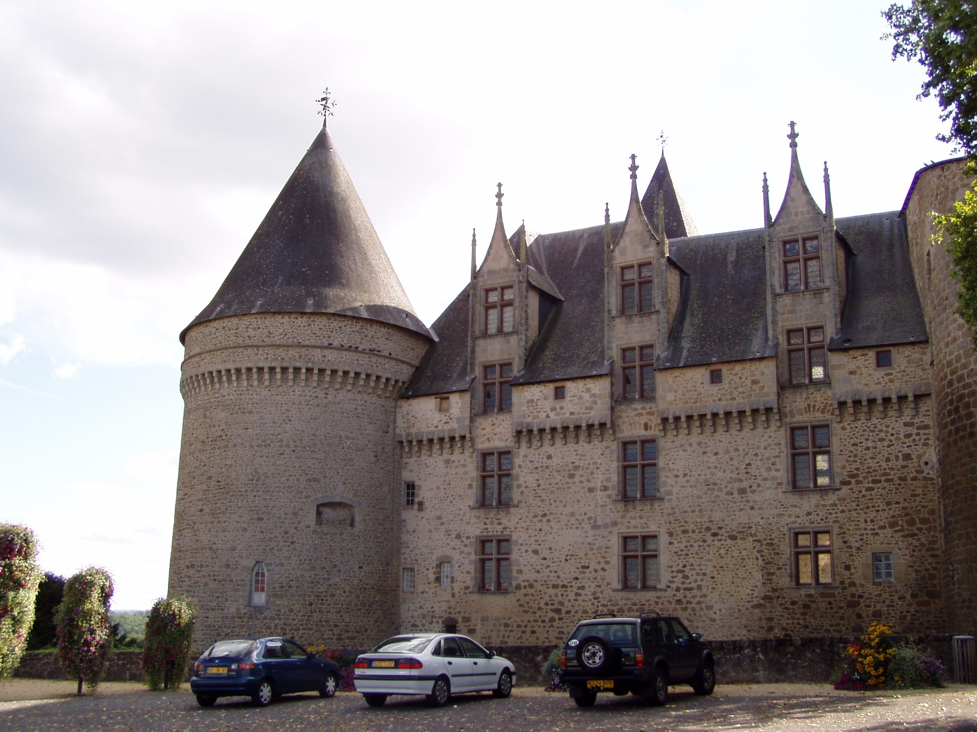 photographie du Château de Rochechouart en Haute-Vienne, prise par Accrochoc le 30 août fr:2006